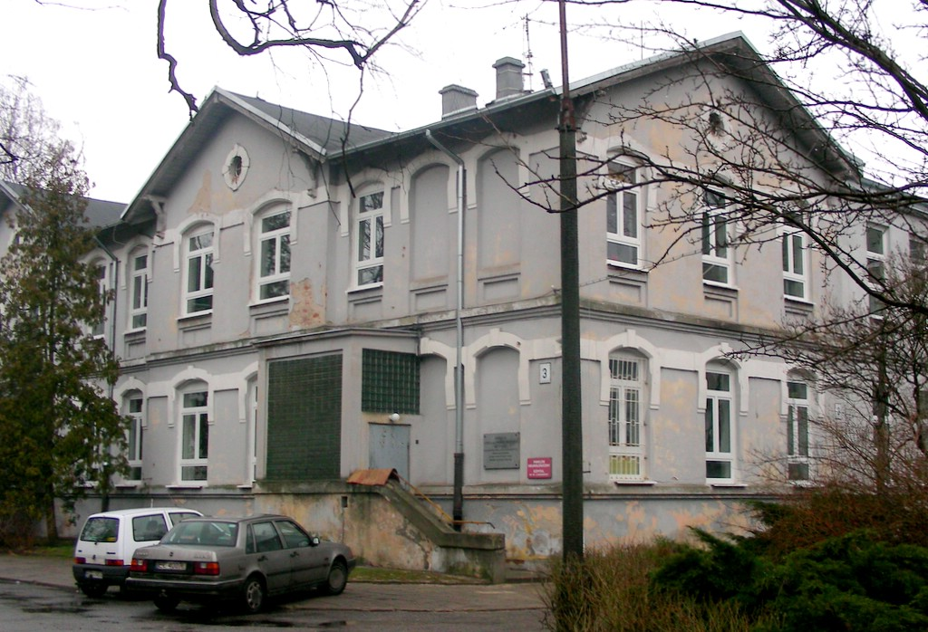 Szpital im. dr. J. Babińskiego w Łodzi, pawilon neurologiczny